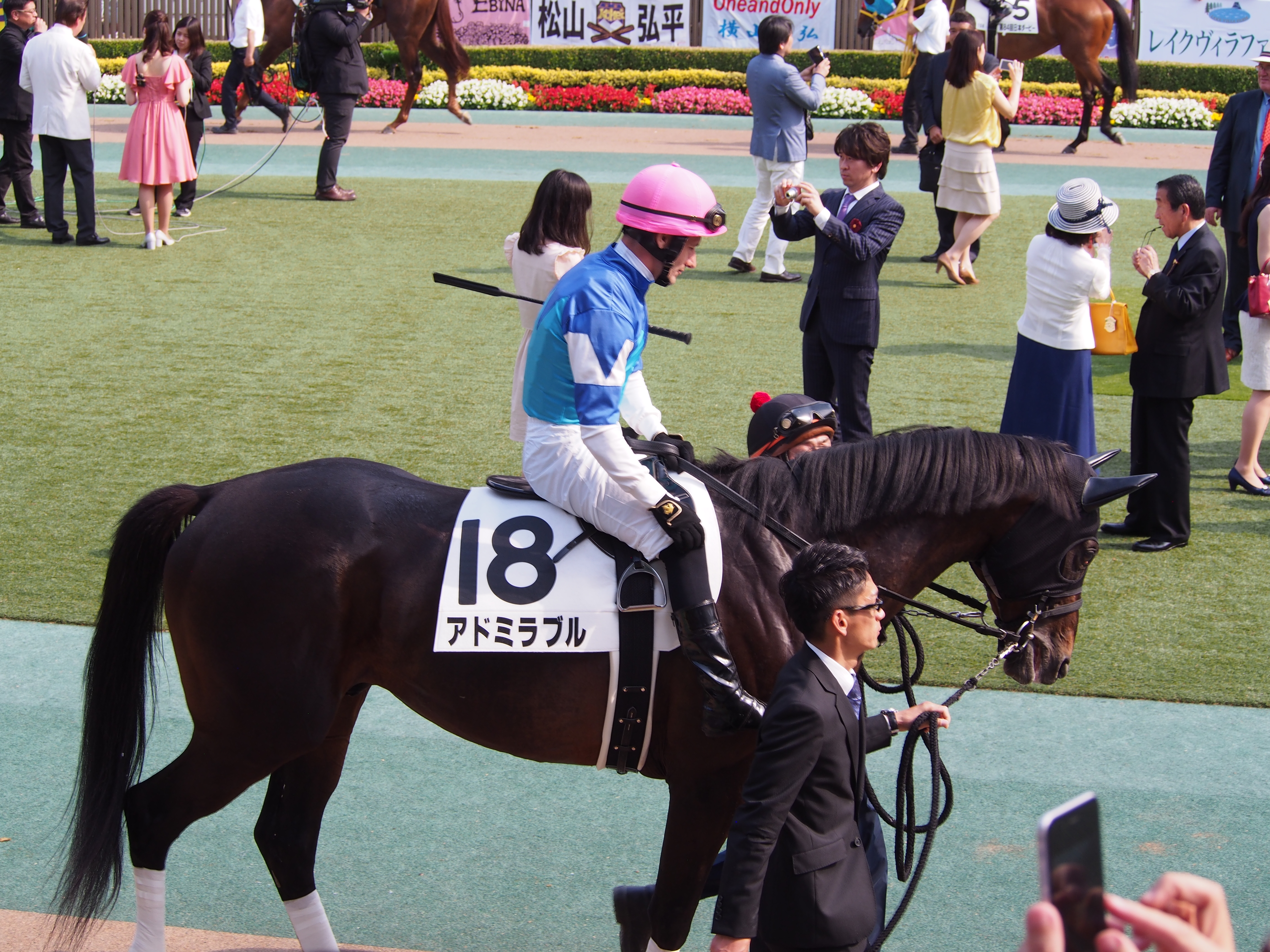 10R Tokyo Yushun Japanese Derby 東京優駿(日本ダービー)